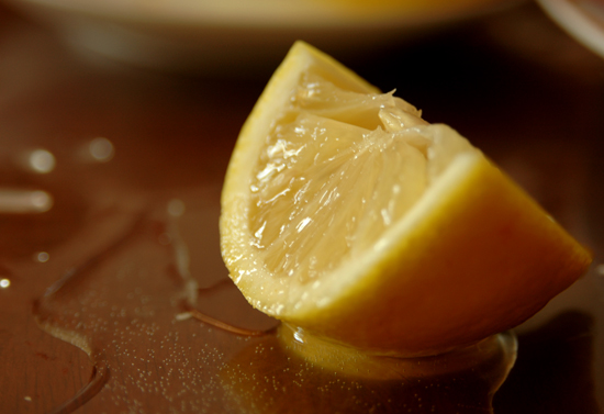 citron coupé en 4